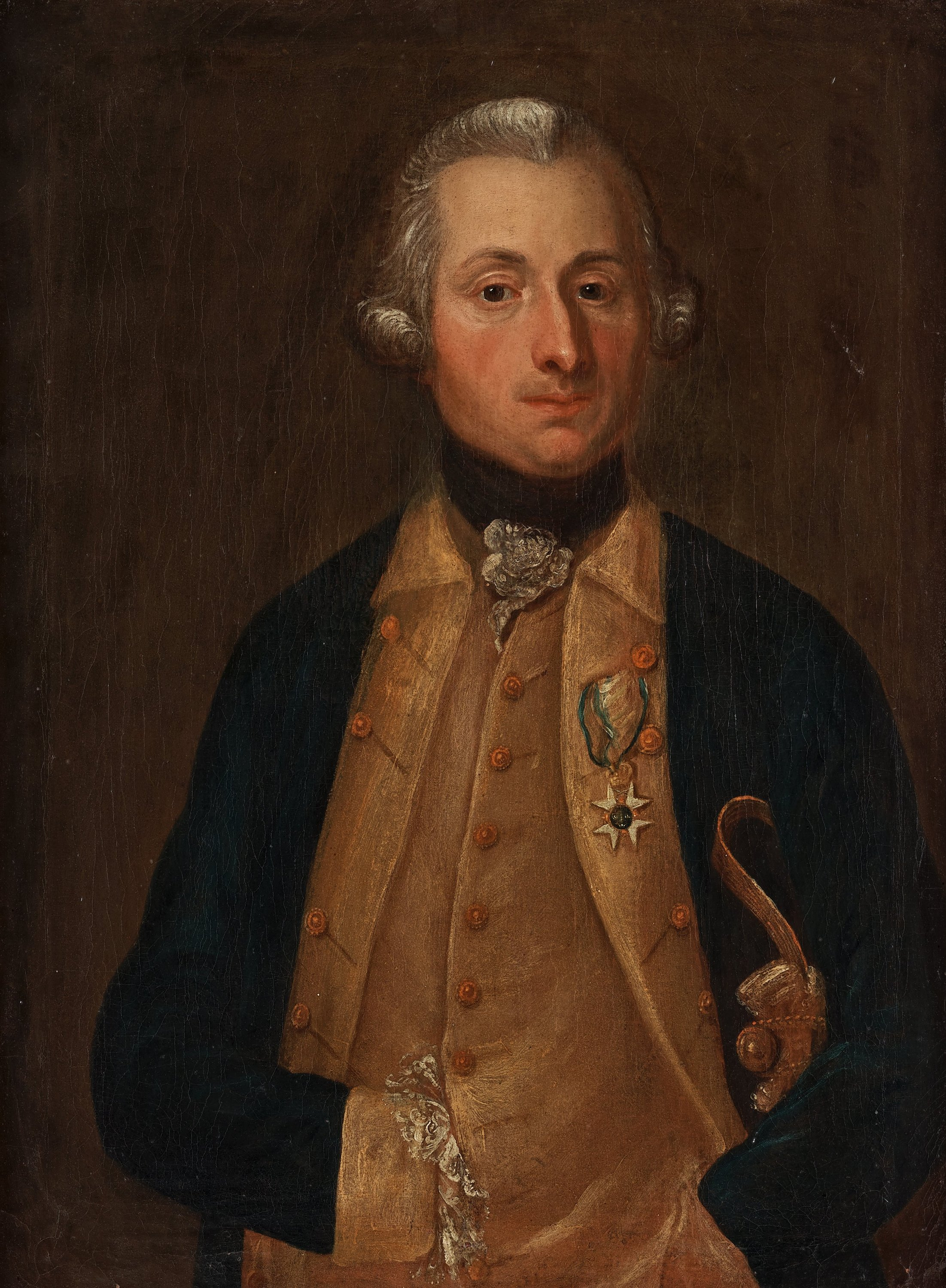 Fredrik Cederström (1731-1774) avporträtterad av Anders Eklund. Daterad 21 december 1770. Har tillhört Familjen Cederström, Beatelunds och Rikstens fideikommiss, Södermanland.